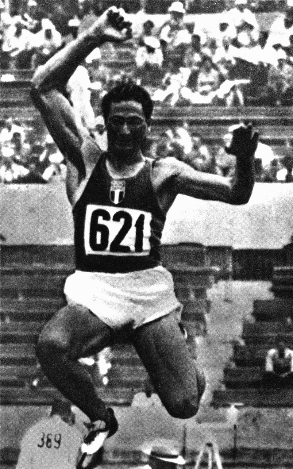 Descrizione: l'atleta italiano Franco Sar ai Giochi olimpici di Roma 1960. Fonte: Autore: ignoto Caricata da: Yiyi Sì, e poi?! 21:23, 18 mag 2013 (CEST)